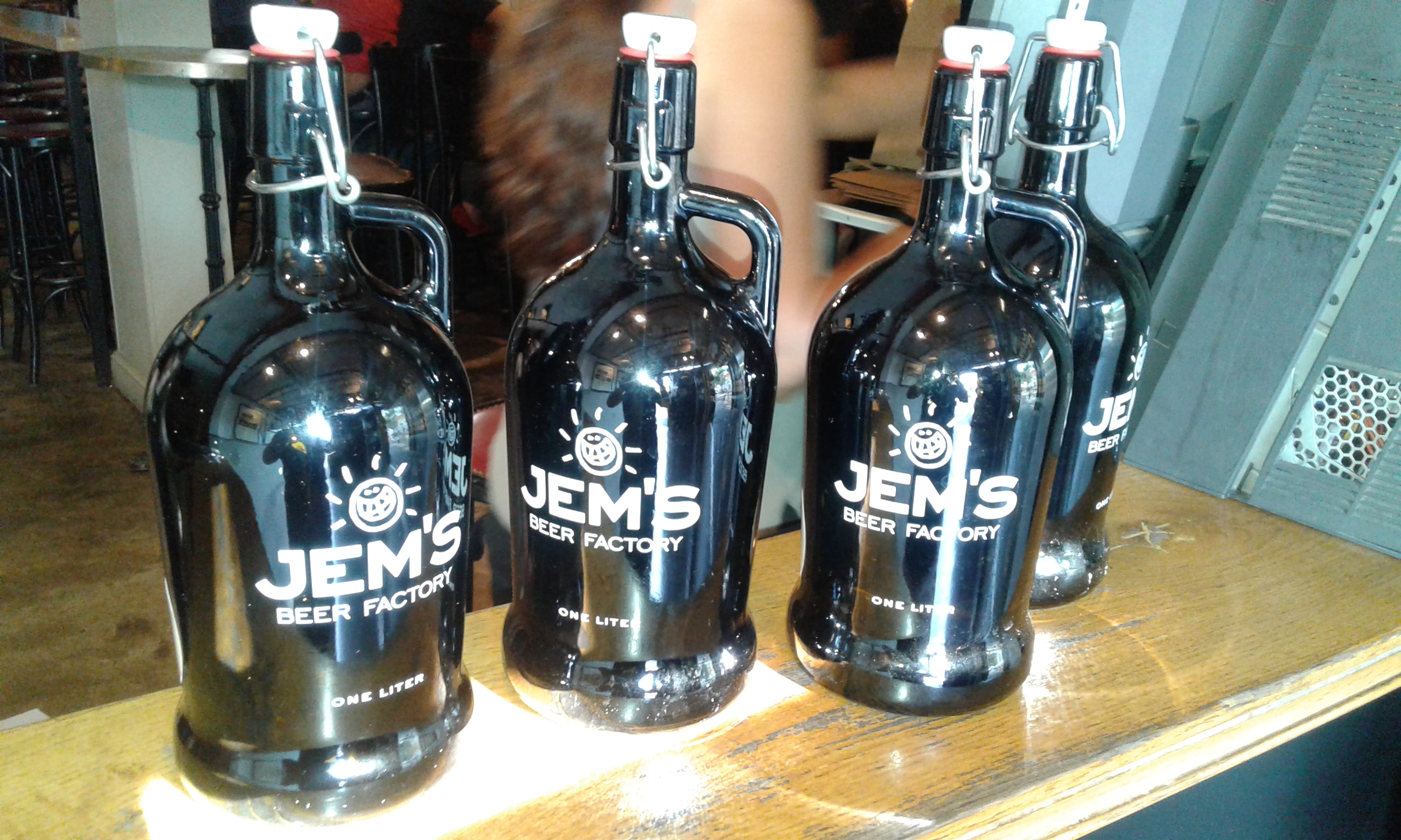 בקבוקי בירה ג'מס